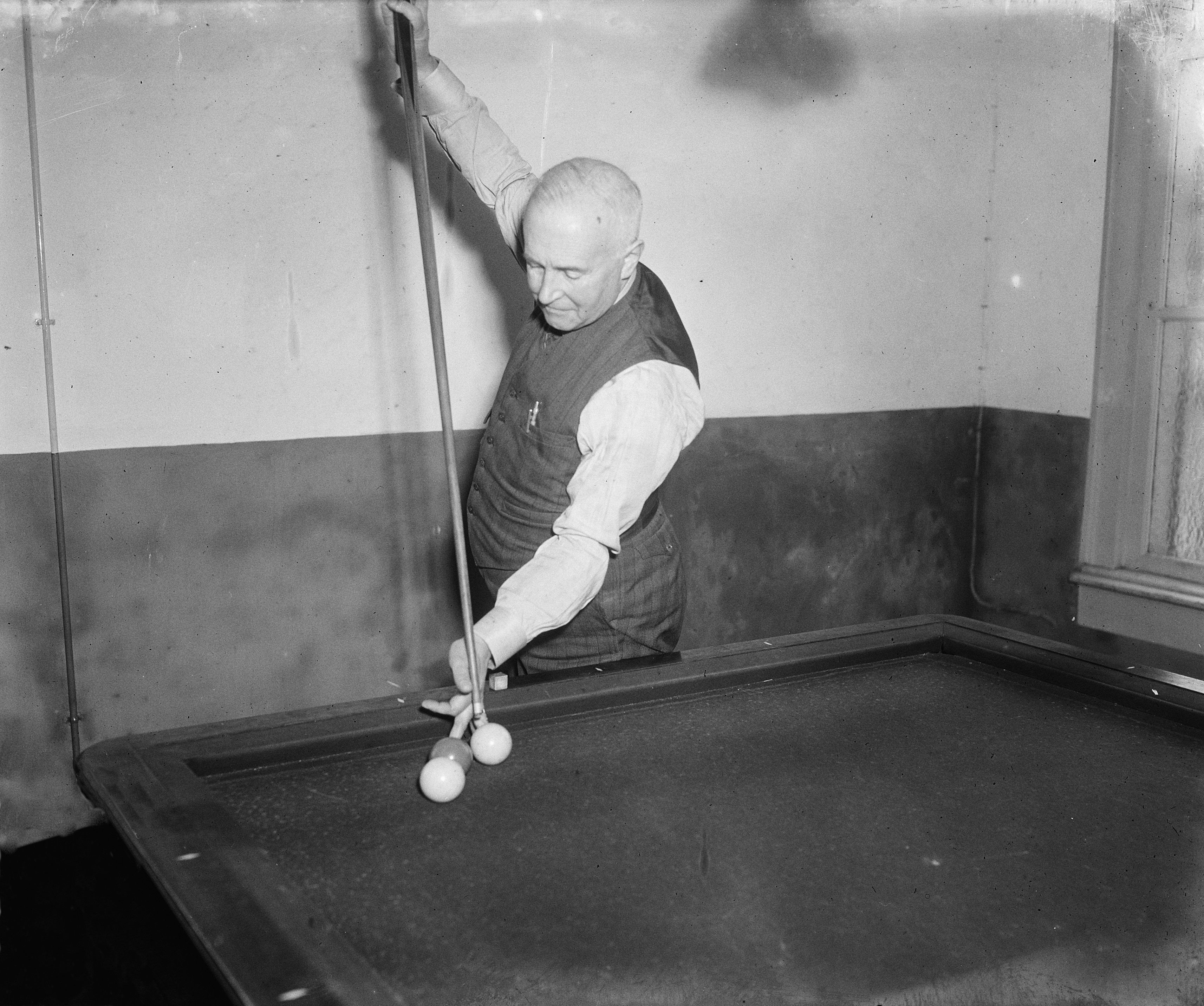 Collectie / Archief : Fotocollectie Anefo Reportage / Serie : [ onbekend ] Beschrijving : Jan Dommering 70 jaar (biljarten) Datum : 17 november 1952 Locatie : Arnhem, Gelderland Trefwoorden : biljarten, sport Persoonsnaam : Dommering, Jan Fotograaf : Pot, Harry / Anefo Auteursrechthebbende : Nationaal Archief Materiaalsoort : Glasnegatief Nummer archiefinventaris : bekijk toegang 2.24.01.09 Bestanddeelnummer : 905-4175